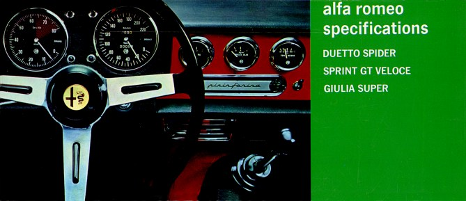 Enda broschyren med Duetto skrivet av fabriken. Alla andra kallar den för Spider